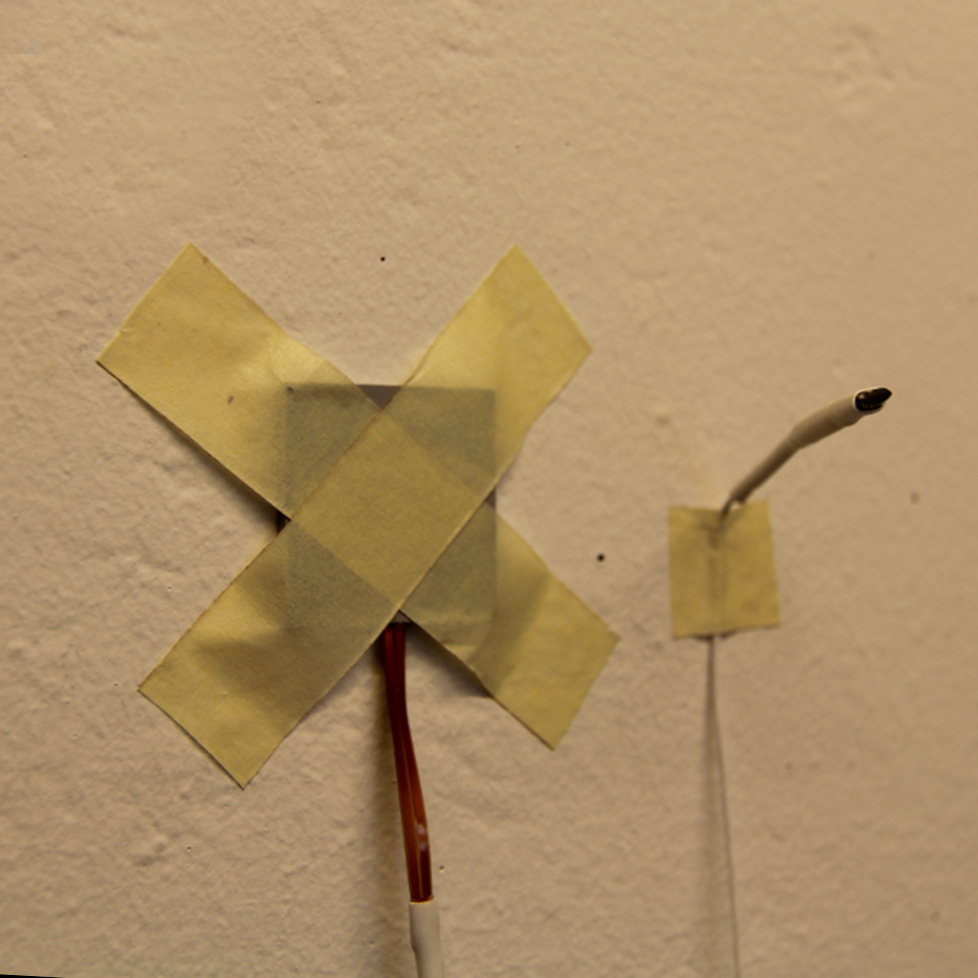 Μέτρηση του συντελεστή θερμοπερατότητας με έναν αισθητήρα ροής θερμότητας gSKIN®-XO (δεξιά) και έναν αισθητήρα θερμοκρασίας (αριστερά)